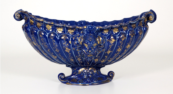 Vasca Farnese, Castelli, ultimo quarto del XVI secolo